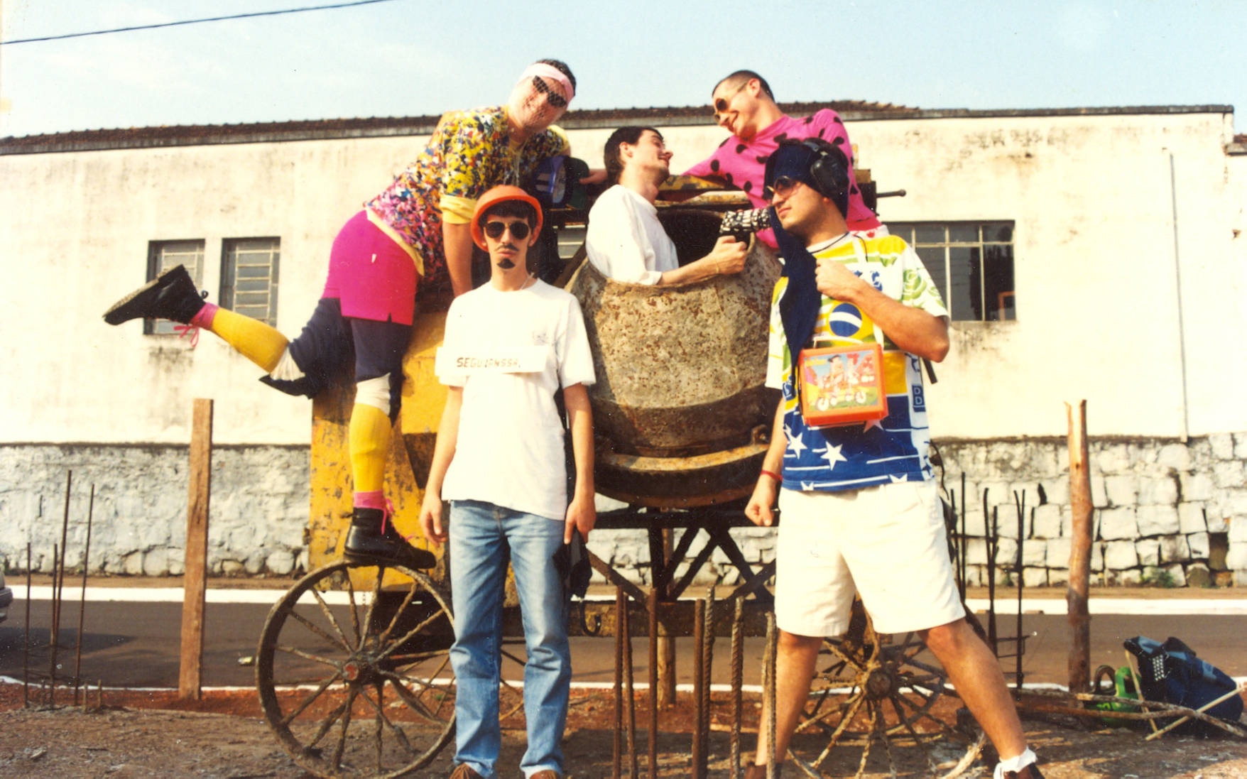 demo-tape, Repolho e a Horta da Alegria